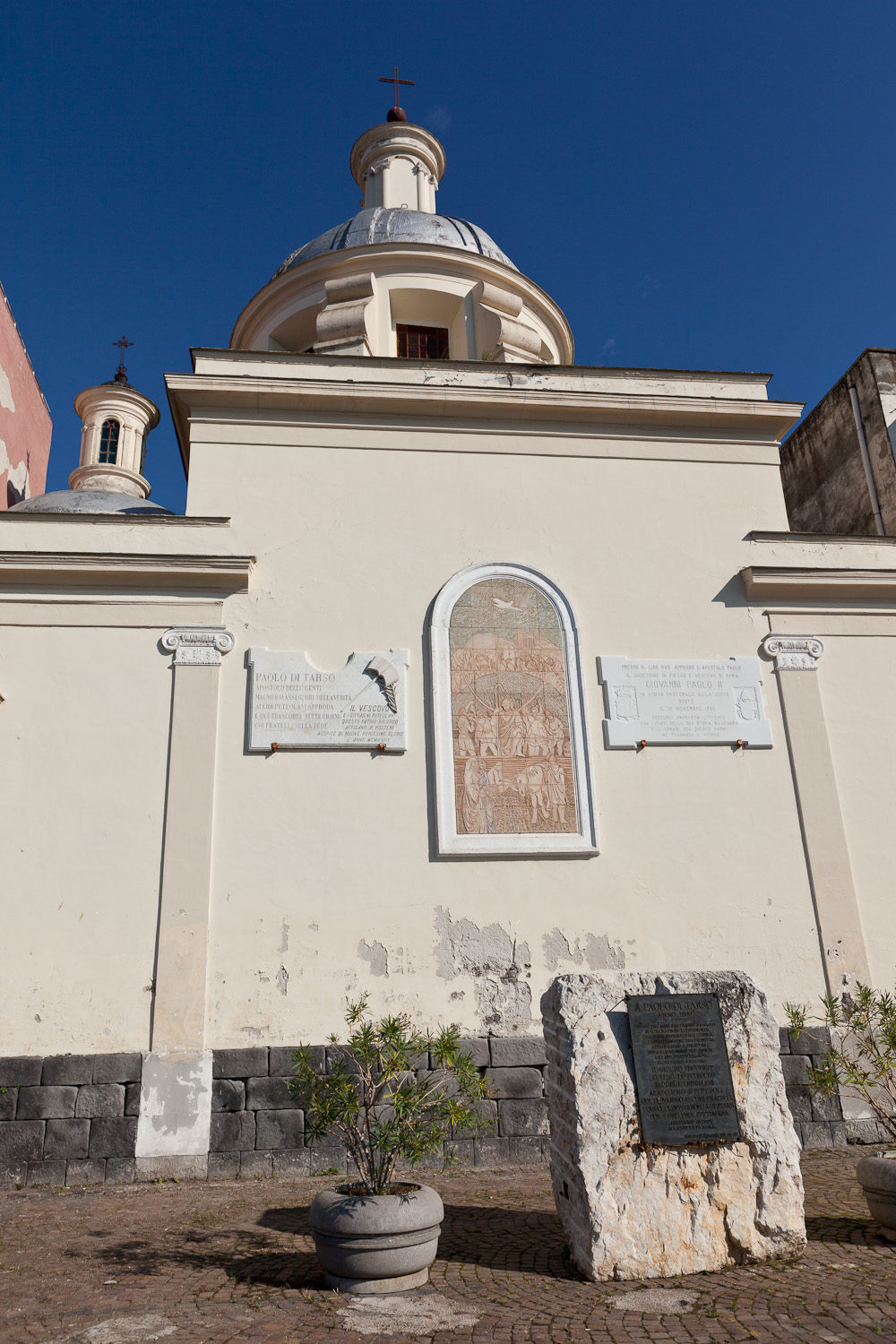 Pozzuoli, Via dell'Emporio: dettaglio posteriore dell'edificio della chiesa di Santa Maria delle Grazie.